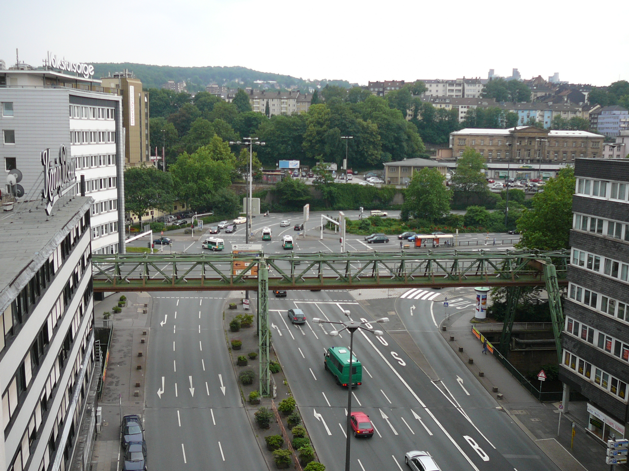 Döppersberg, Wuppertal